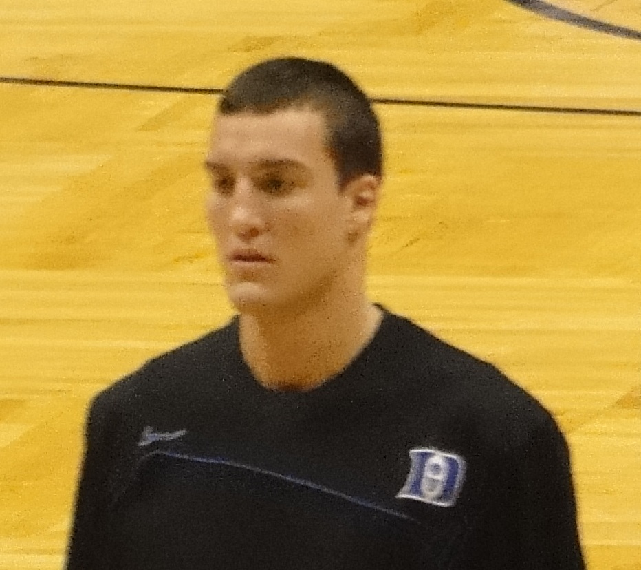 Miles Plumlee